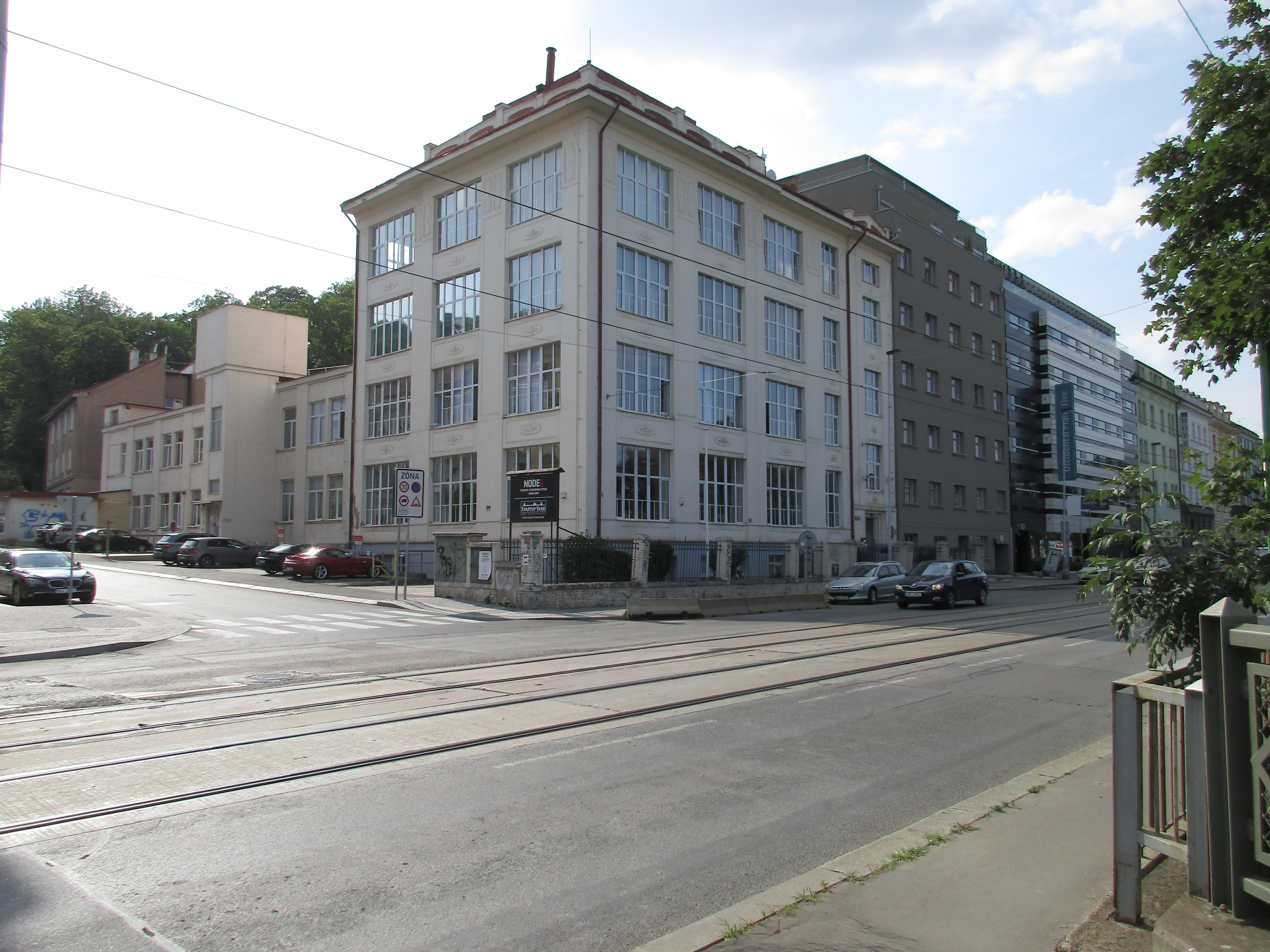 Radlická 180/50, Praha 5 - Smíchov. Budova bývalé továrny na stávkové zboží P. B. Branda.